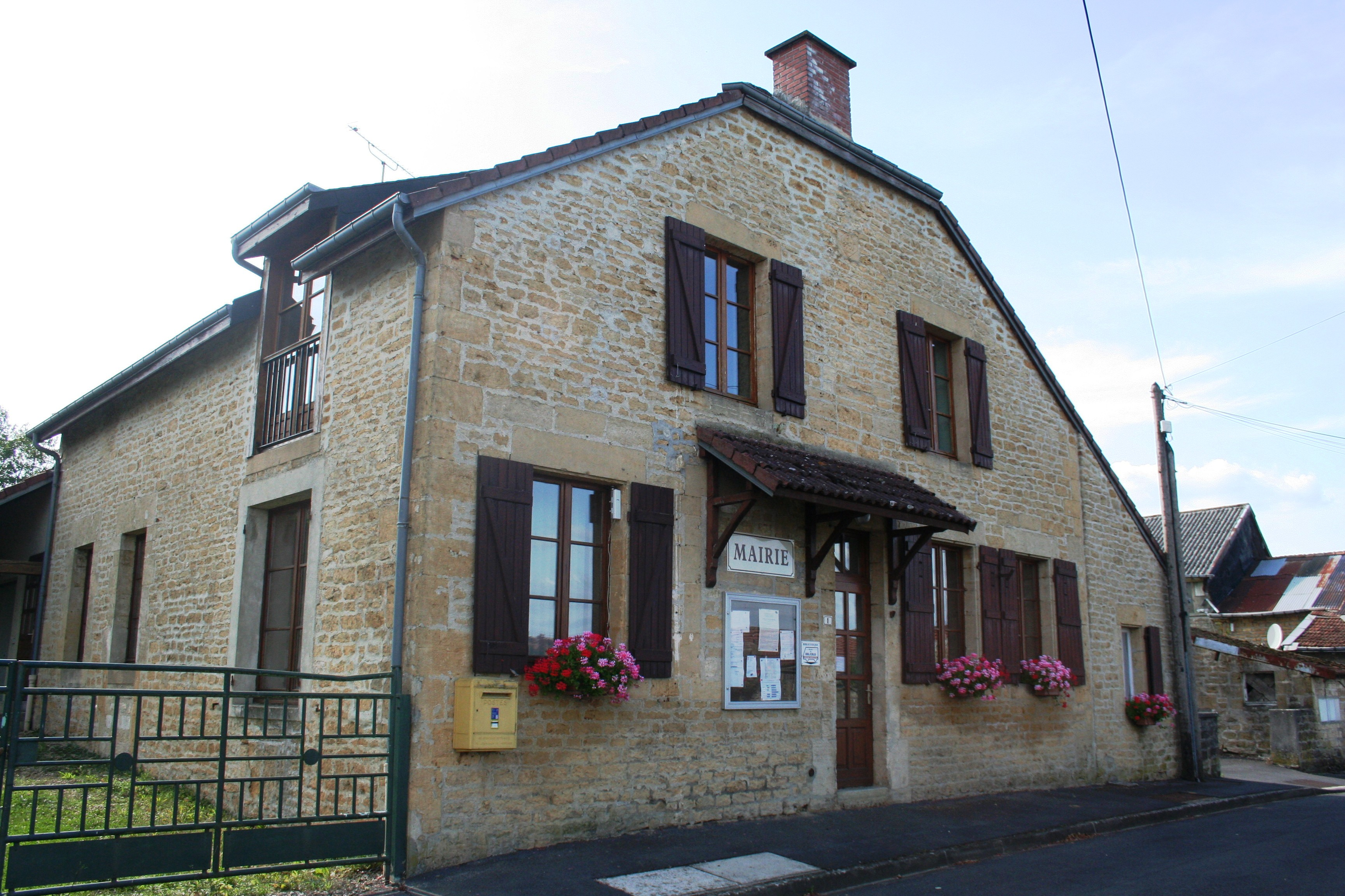 Village Ardennais